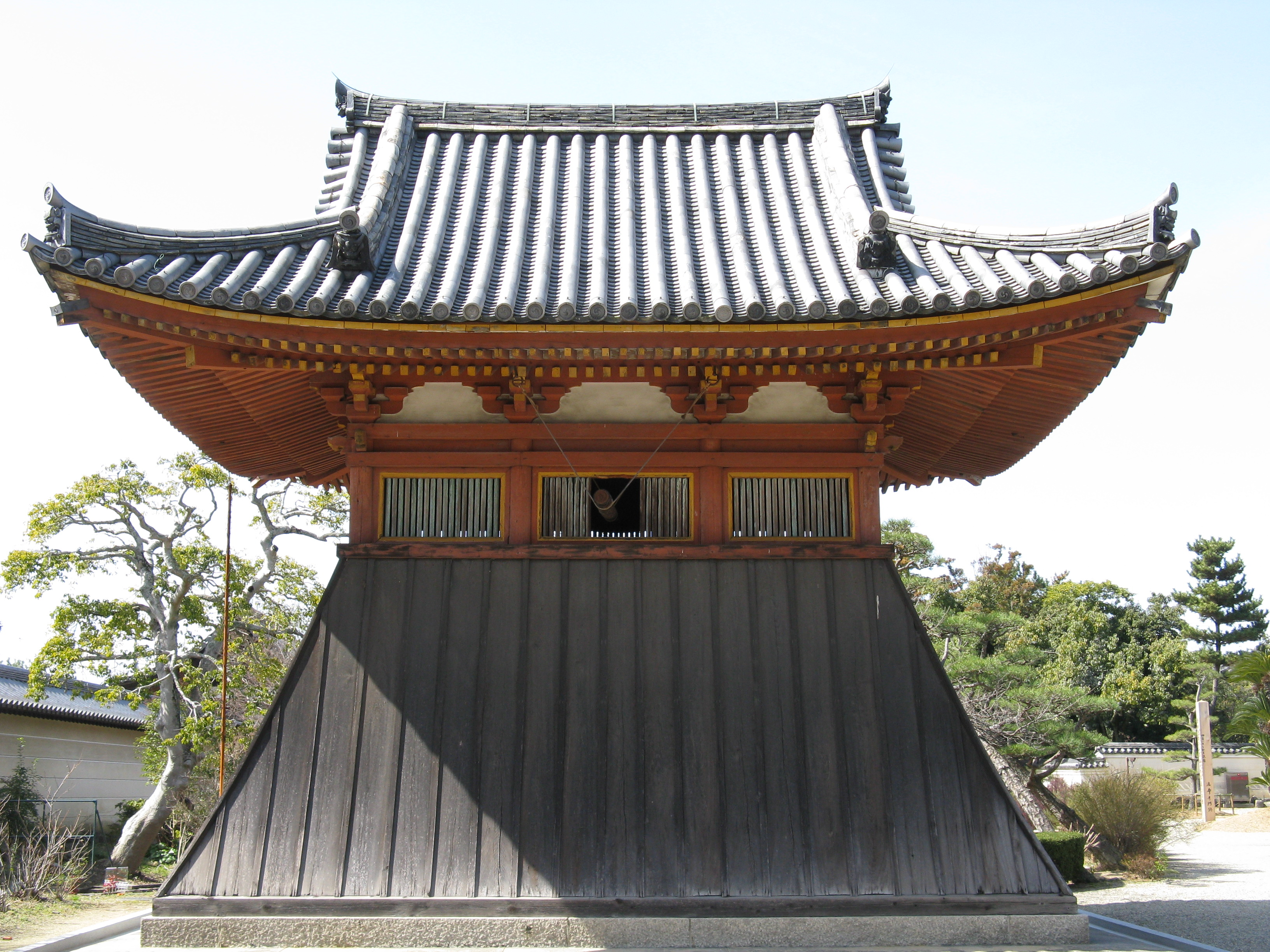 法華滅罪之寺 鐘楼